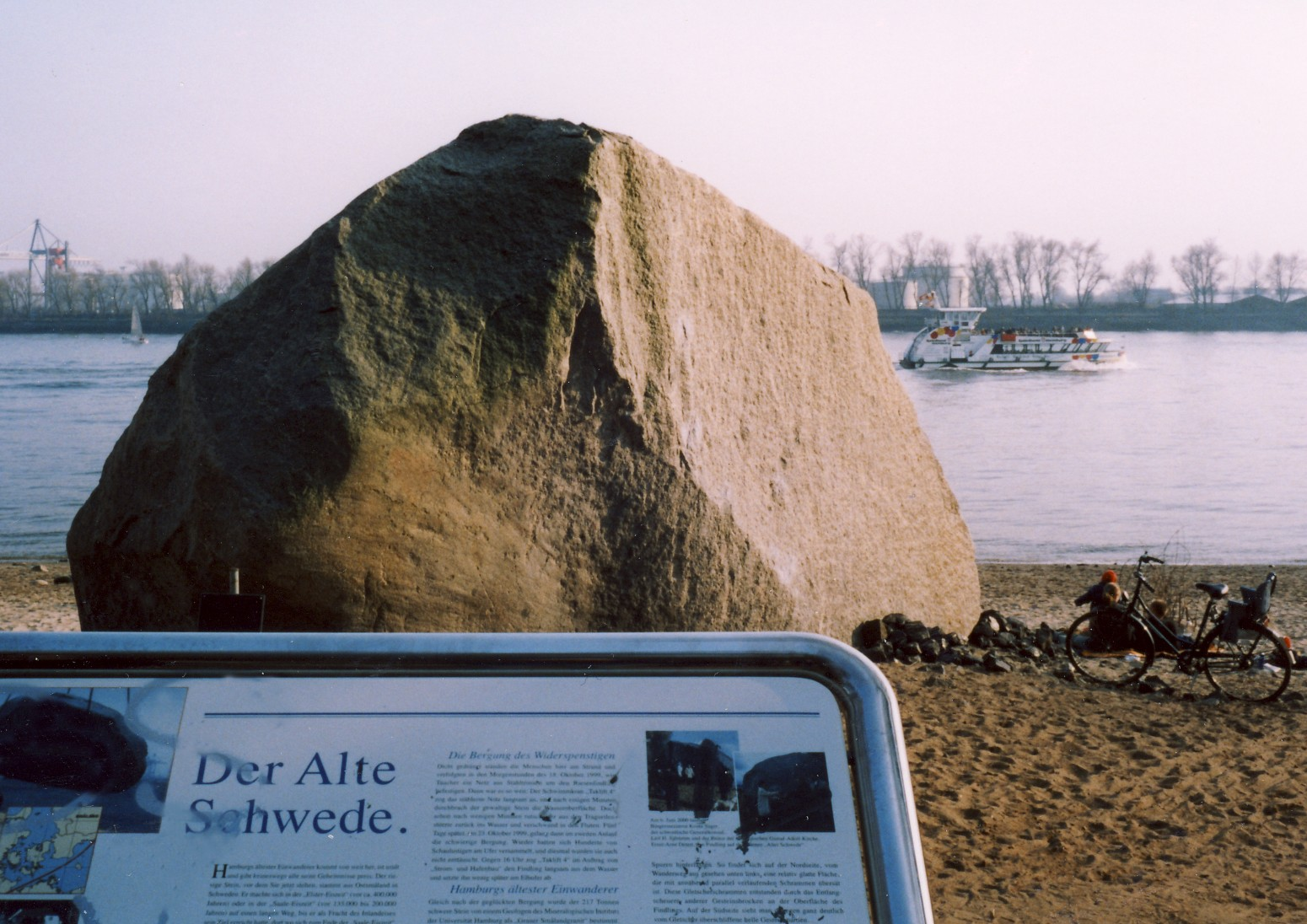 "Der Alte Schwede", Findling aus Schonen (Schweden) an der Elbe i Hamburg